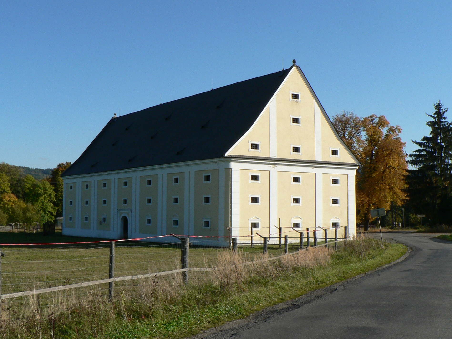 Barokní sýpka ve Velkých Losinách.